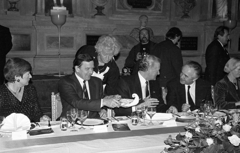 20.-21.12.1990 Konferenz der Regierungschefs der 16 Bundesländer der Bundesrepublik Deutschland in München 20.12. Abendessen im Antiquarium der Residenz